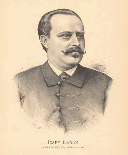 Portréty českých osobností od Jana Vilímka